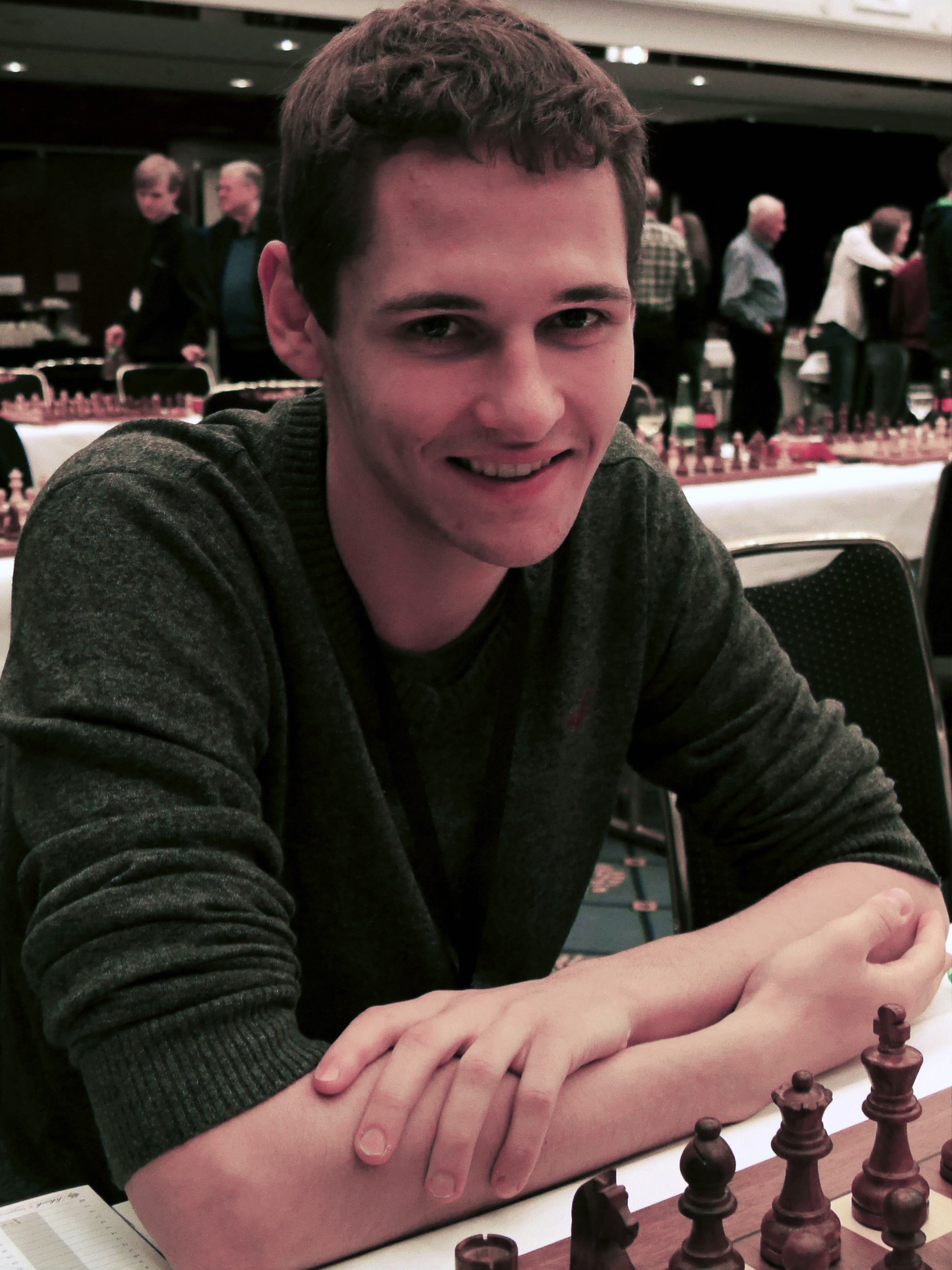 Nico Georgiadis, Finalrunden der deutschen Schachbundesliga 2017 in Berlin.